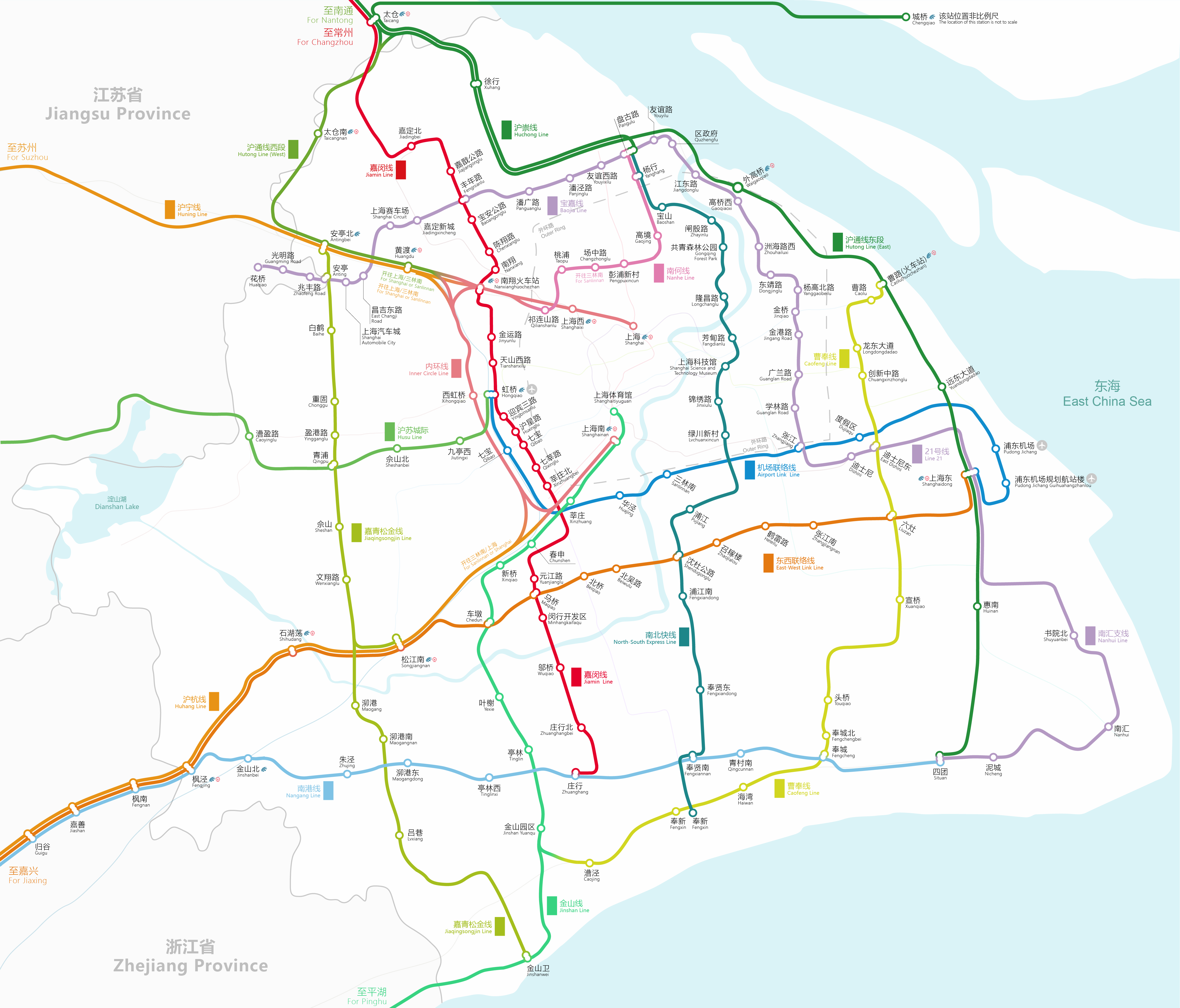 上海市域轨道交通2035规划图